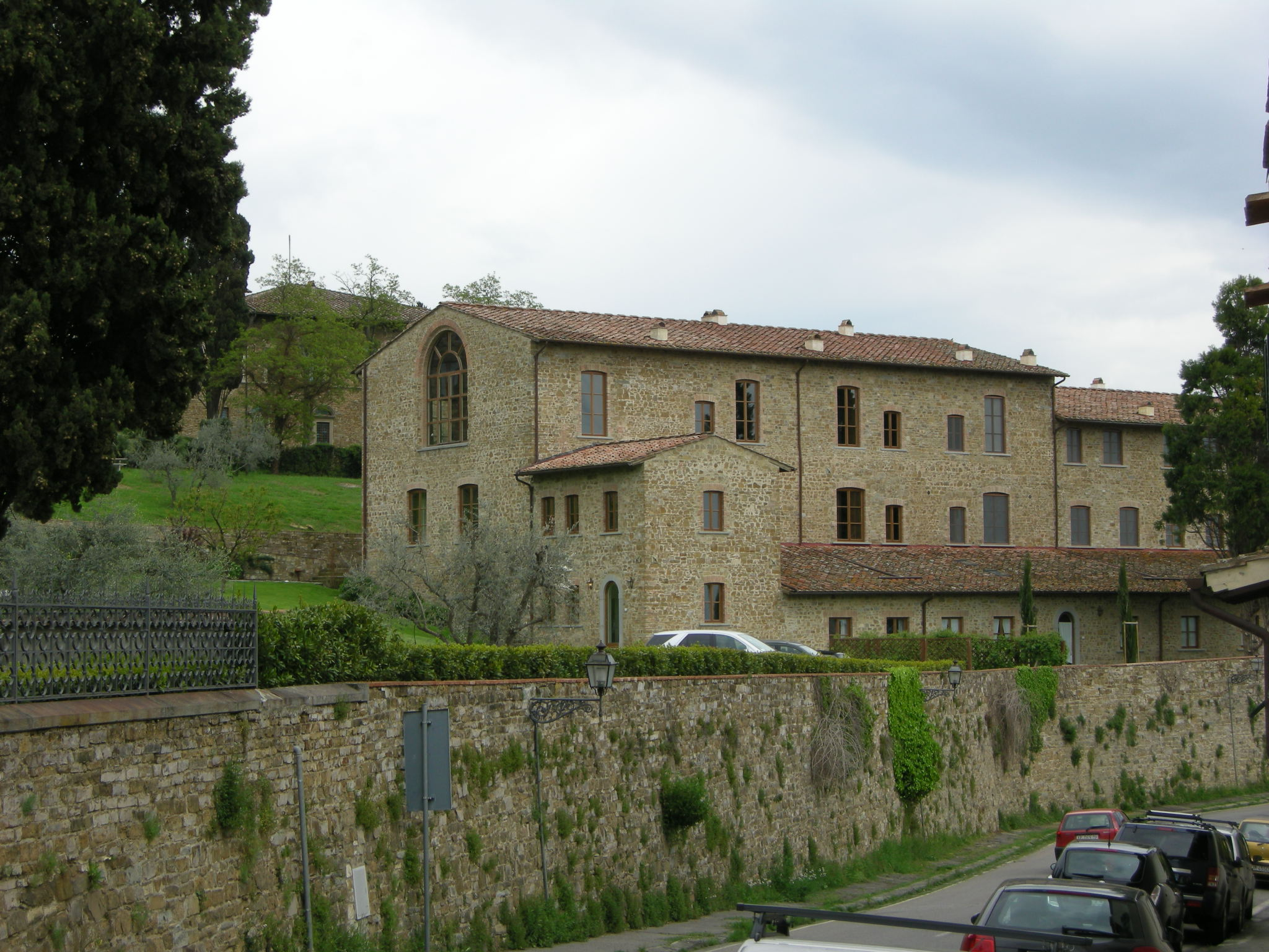 Capannoni della torre del gallo